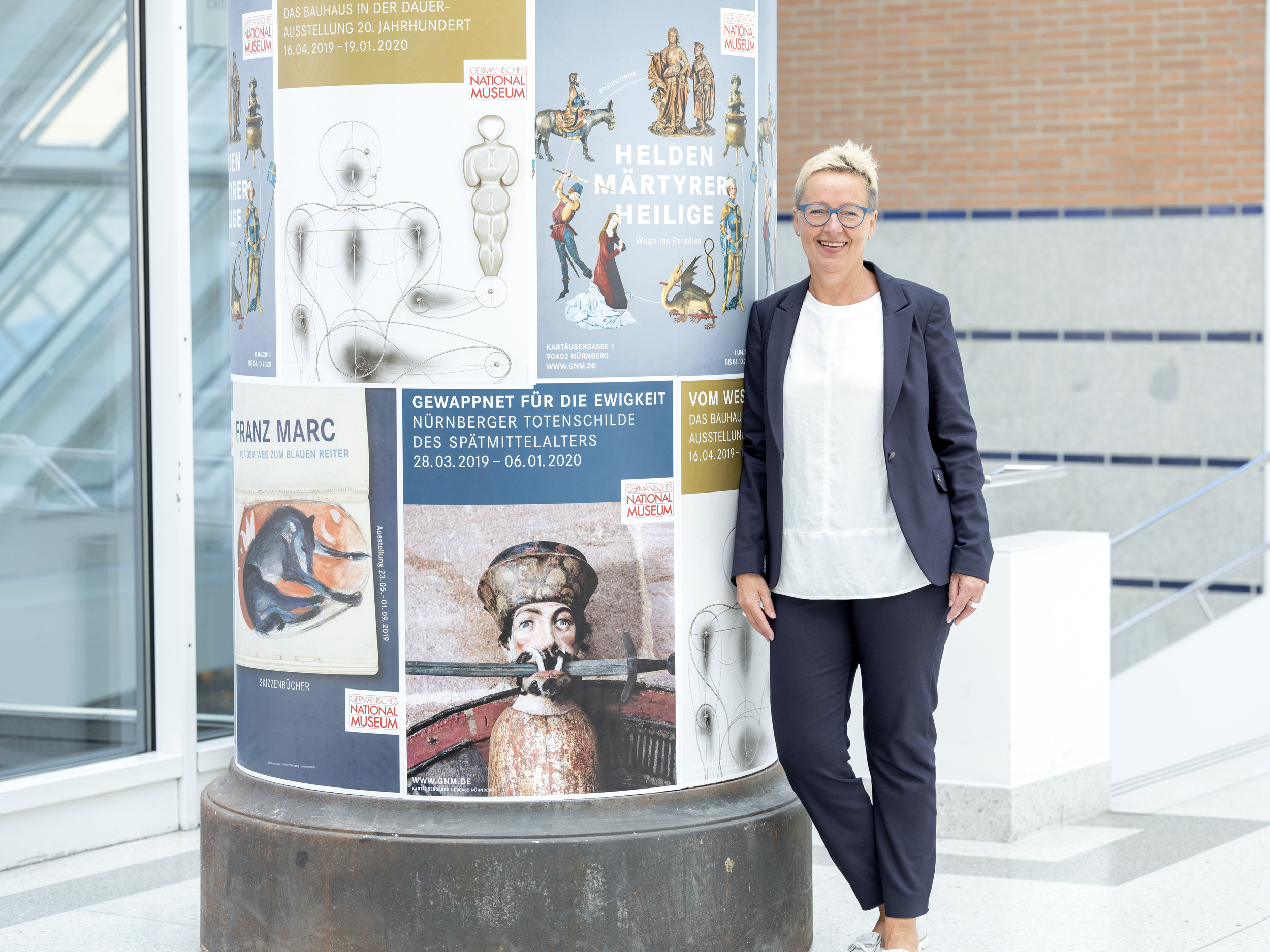 Portrait Dr. Andrea Langer in der Eingangshalle im Germanischen Nationalmuseum in Nürnberg.